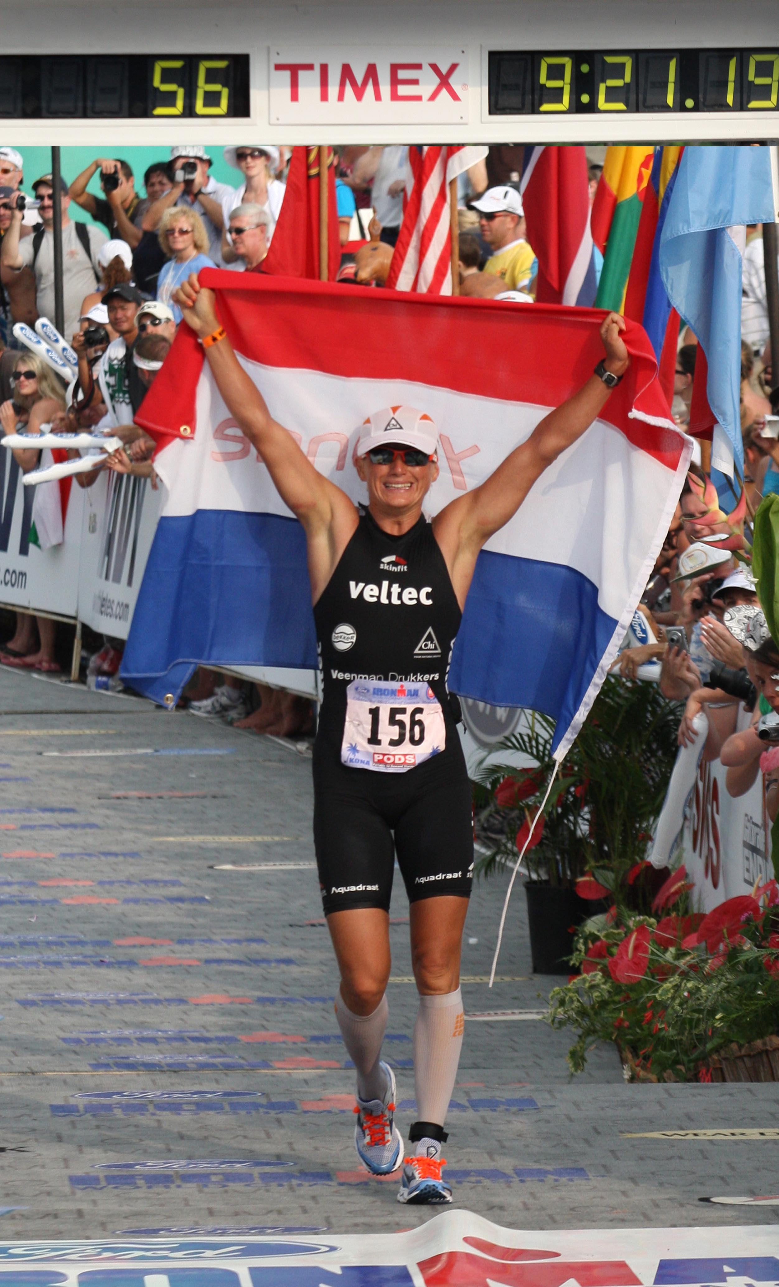 Yvonne van Vlerken beim Ironman Hawaii 2008.